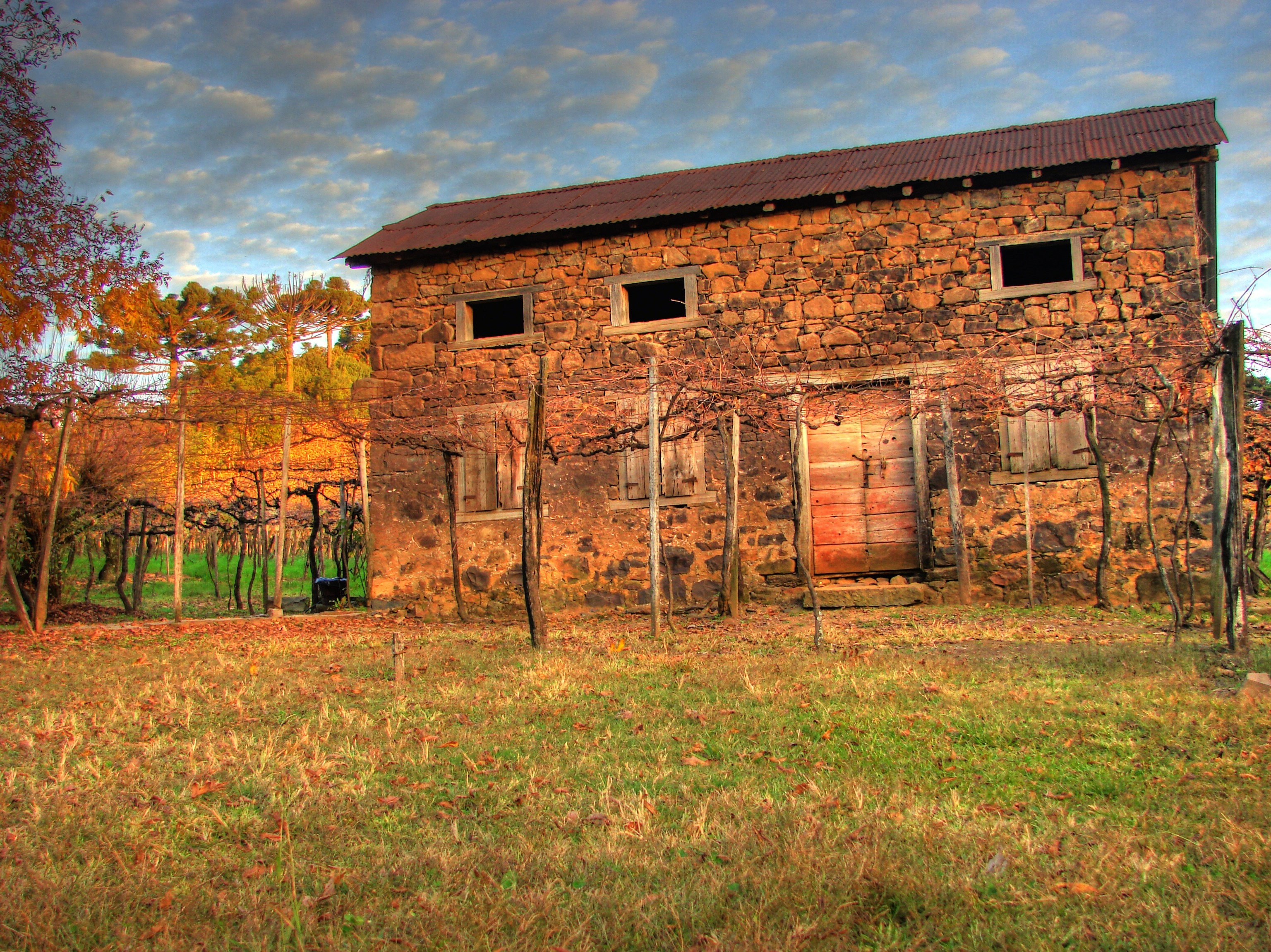 Casa Strapazzon, onde foi filmado o filme "O Quatrilho".